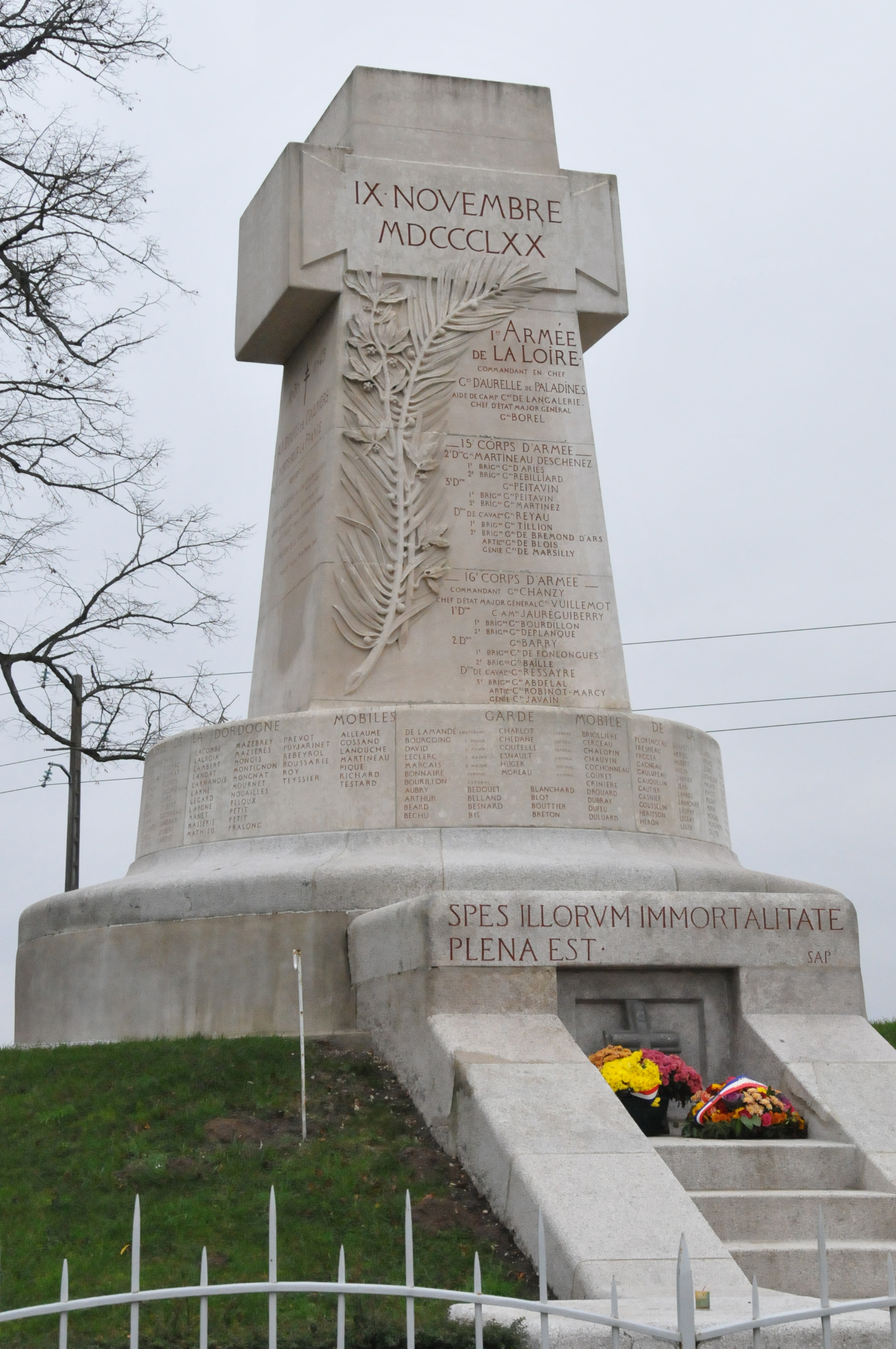 Coulmiers (Loiret) Monument aux morts de la bataille le 9 novembre 1870